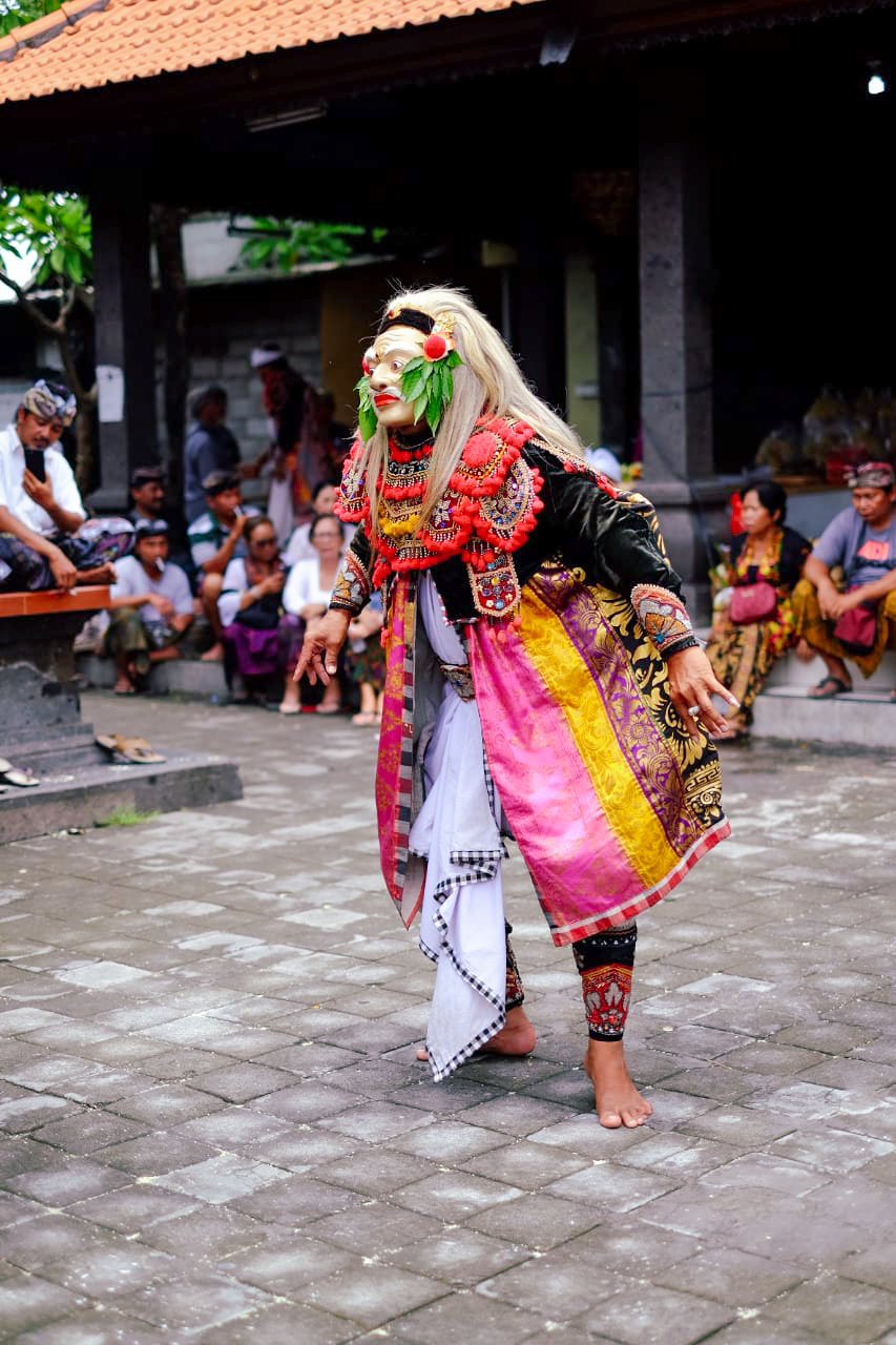 Objek di dalam foto ini adalah topeng sidakarya, dimana topeng sidakarya itu memiliki arti bahwa suatu upacara sudah selesai dilakukan.